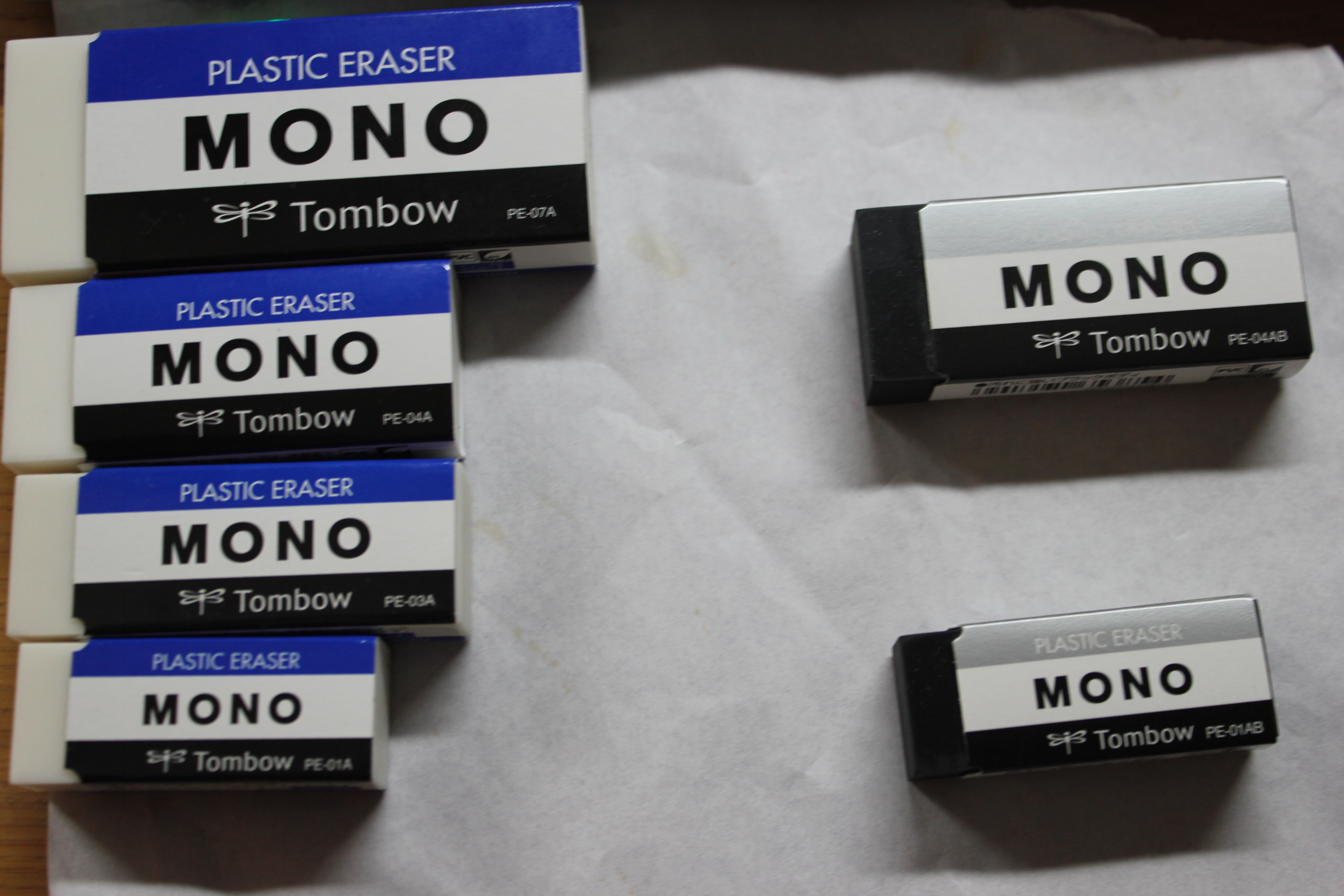 さまざまな種類があり、白いMONOは5種類ある。